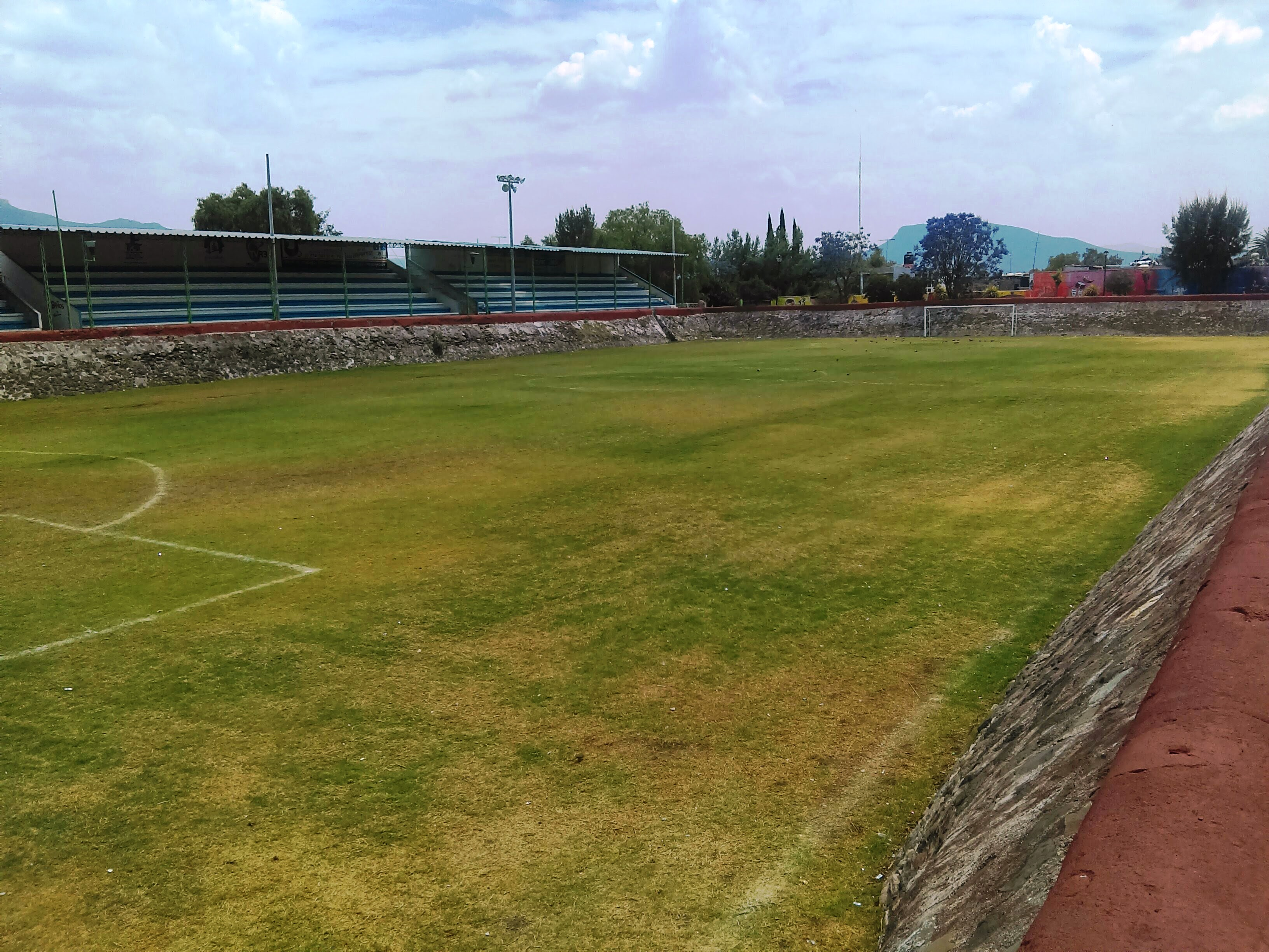 Complejo Deportivo Los Frailes en Actopan, Hidalgo, México